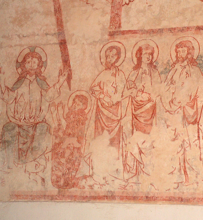 Ausschnitt der Fresken in der Kirche Sankt Maurenzen